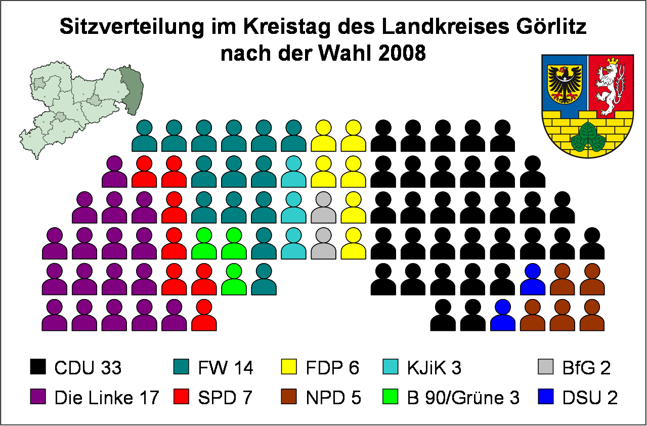 Sitzverteilung im Kreistag des Landkreises Görlitz nach der Wahl vom 8. Juni 2008 Hornjoserbsce: Rozdźělenje sydłow w Zhorjelskim wokrjesnym sejmiku po wólbach 8. smažnika 2008